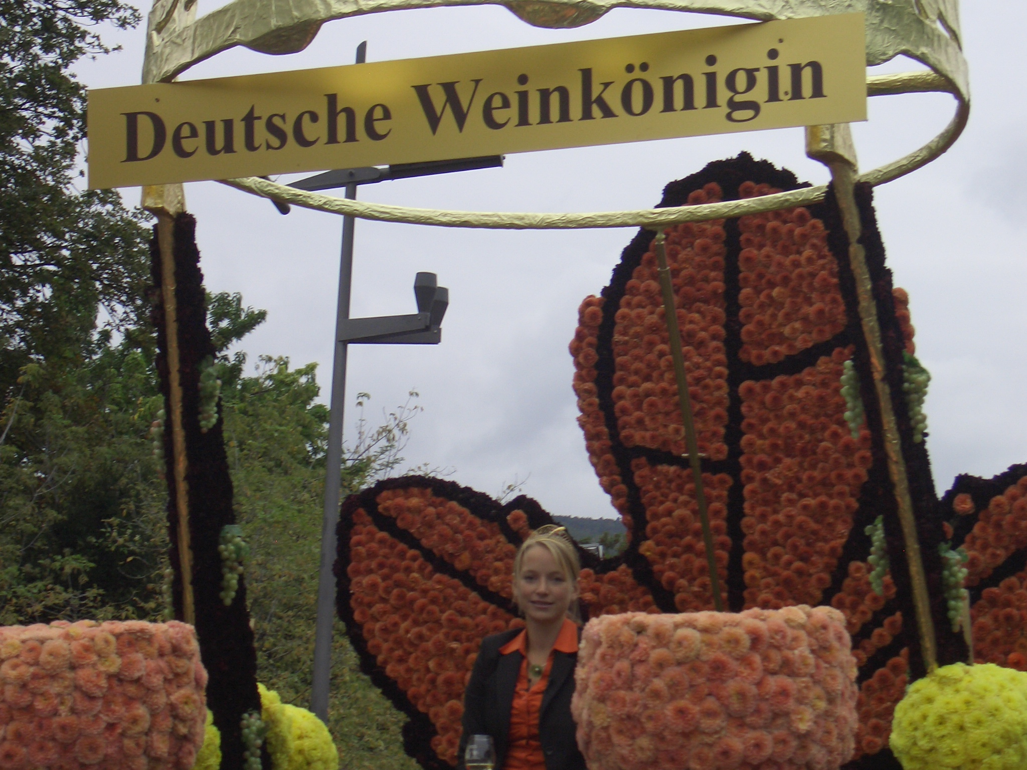 Die Deutsche Weinkönigin Sonja Christ beim Winzerfestzug in Neustadt an der Weinstraße